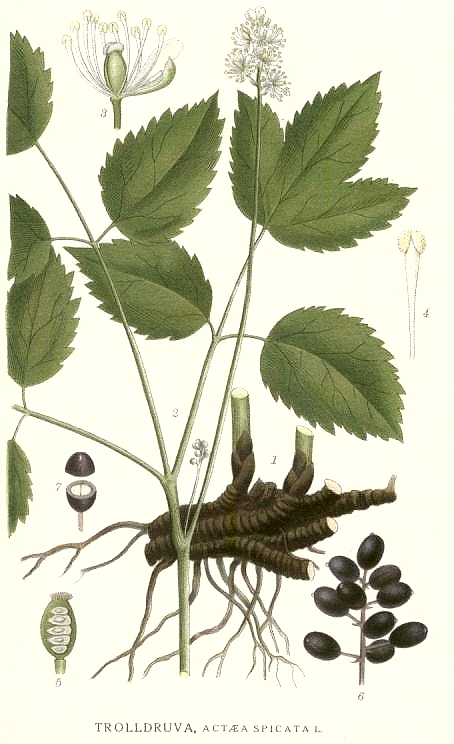 Original Description Trolldruva, Actaea spicata L.